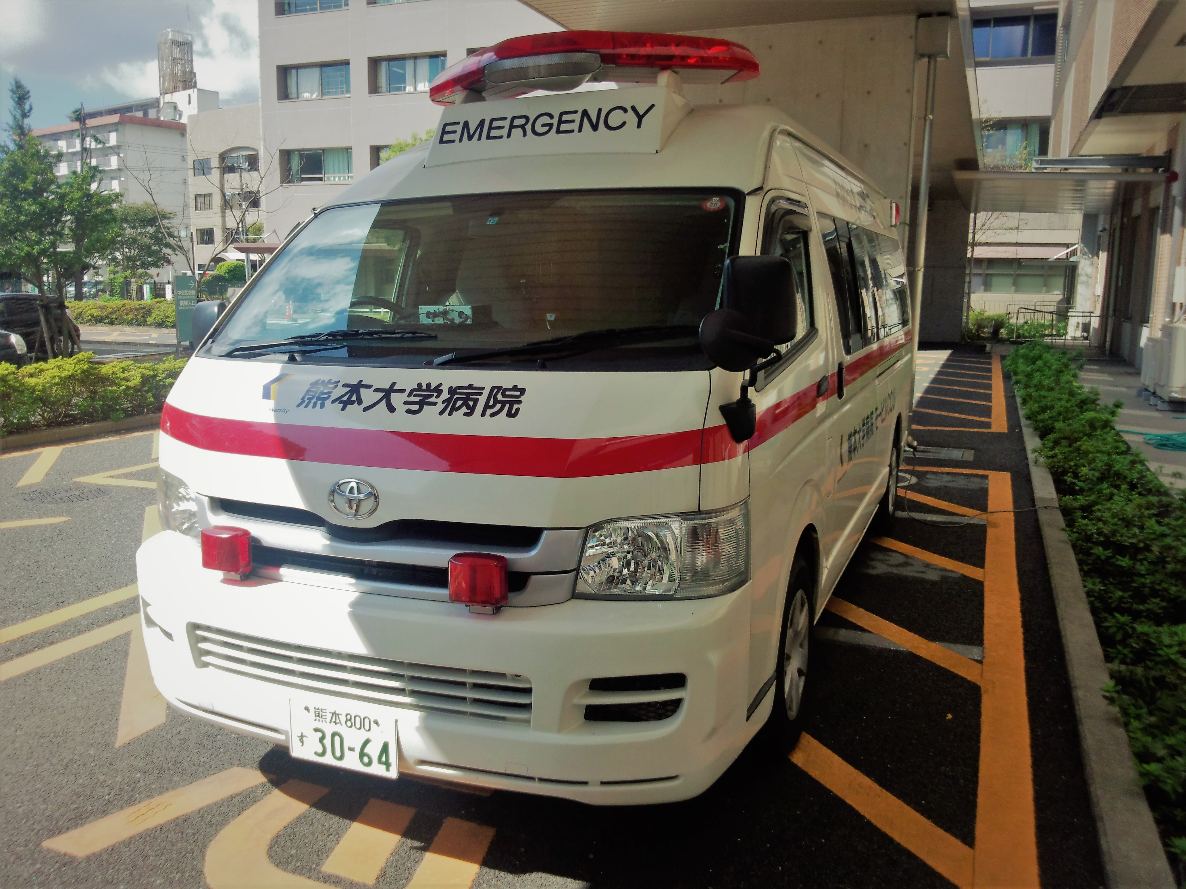 レジアスエースベースの熊本大学医学部附属病院循環器科 モービルCCU(イズミ車体架装)